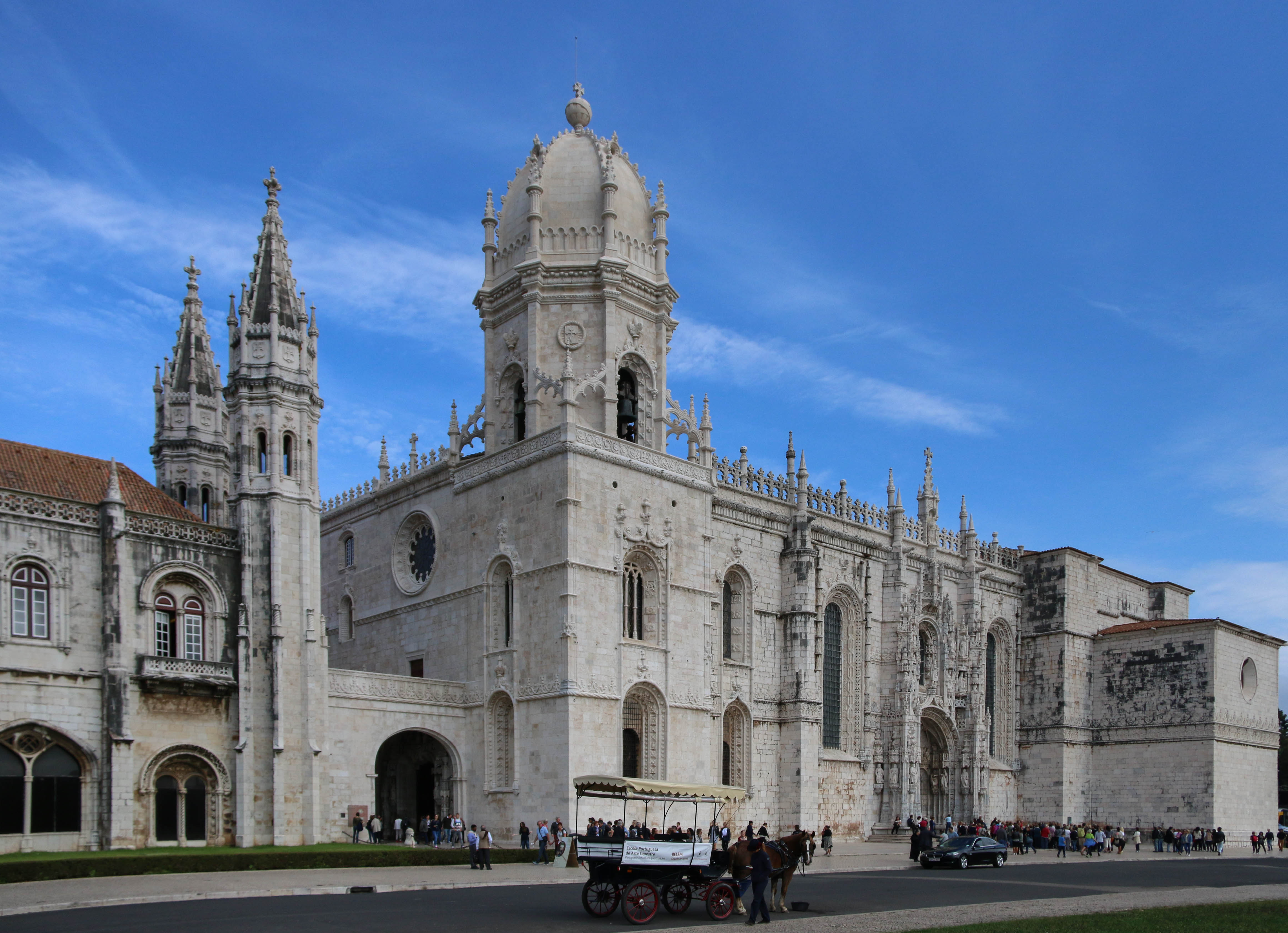 Le Mosteiro dos Jeronimos